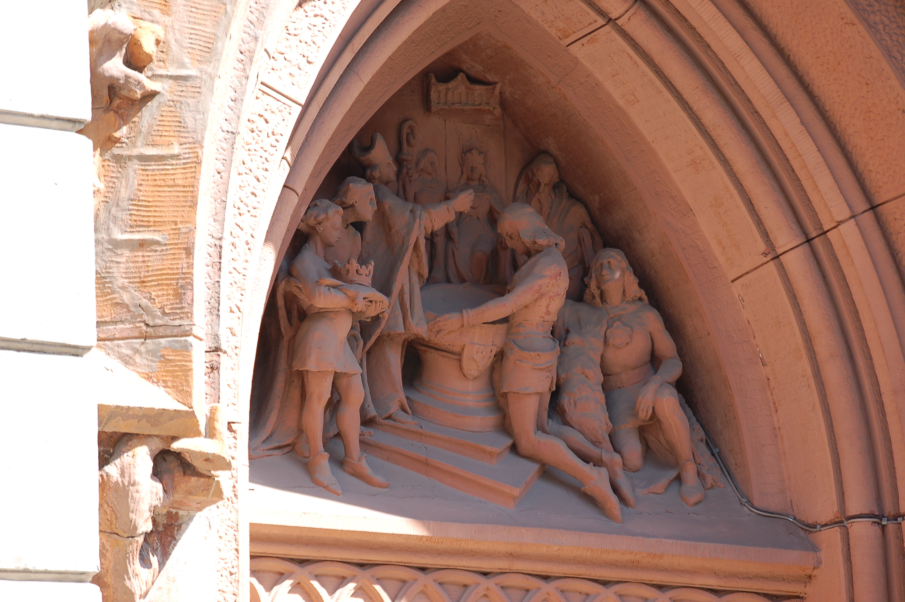 Костьол св. Миколая у Києві (Червоноармійська вулиця, 75)